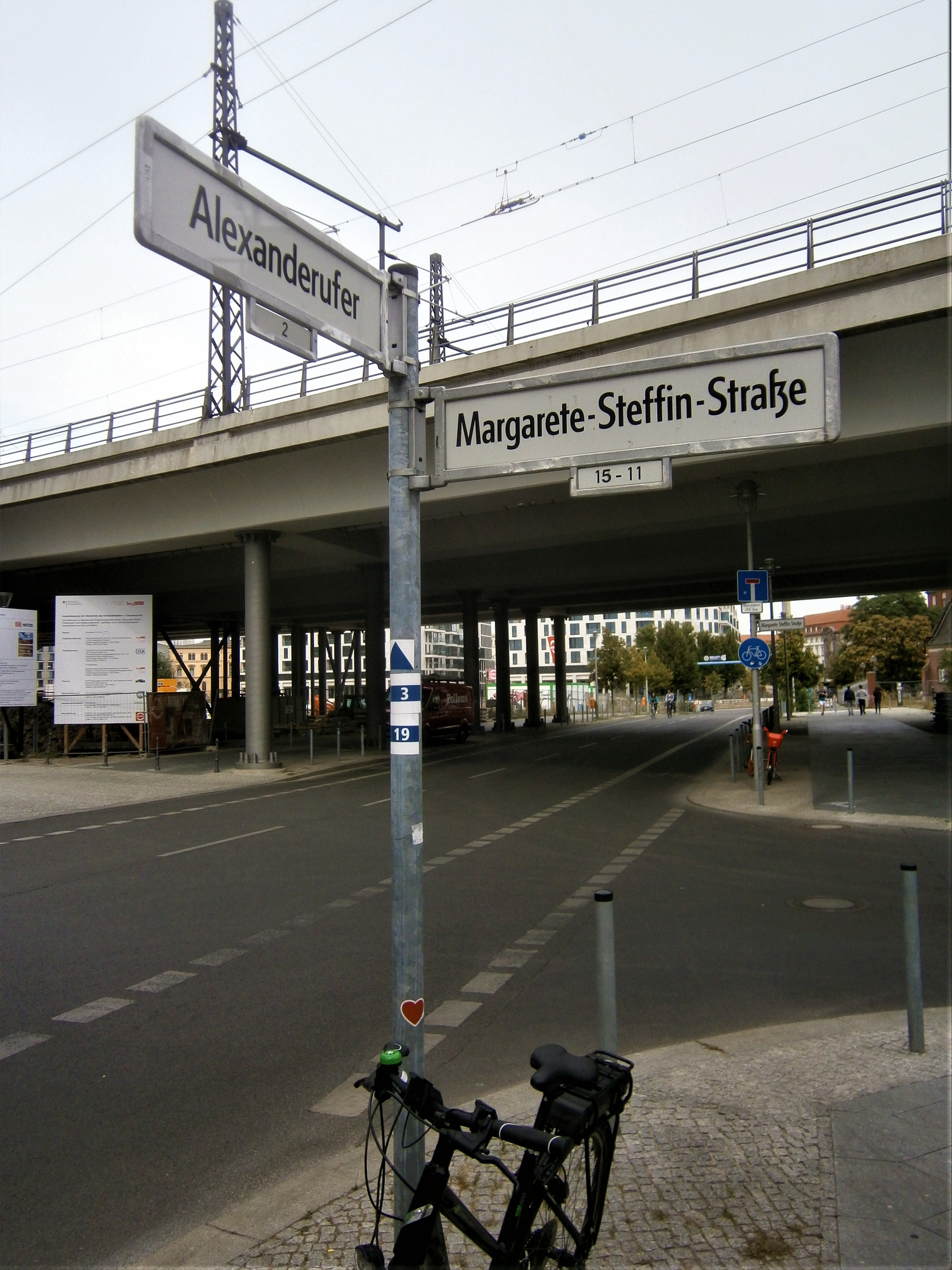 Die 20 grünen Hauptwege sind in Berlin innerstädtische Wander- und Spazierwege, die Grünflächen , Parks und Sichtpunkte der Stadt vrbinden. Im Bild die Unterquerung des Stadtbahnviadukts durch die Straße Alexander-Ufer in Höhe vom Futurium in Richtung Humboldthafen.